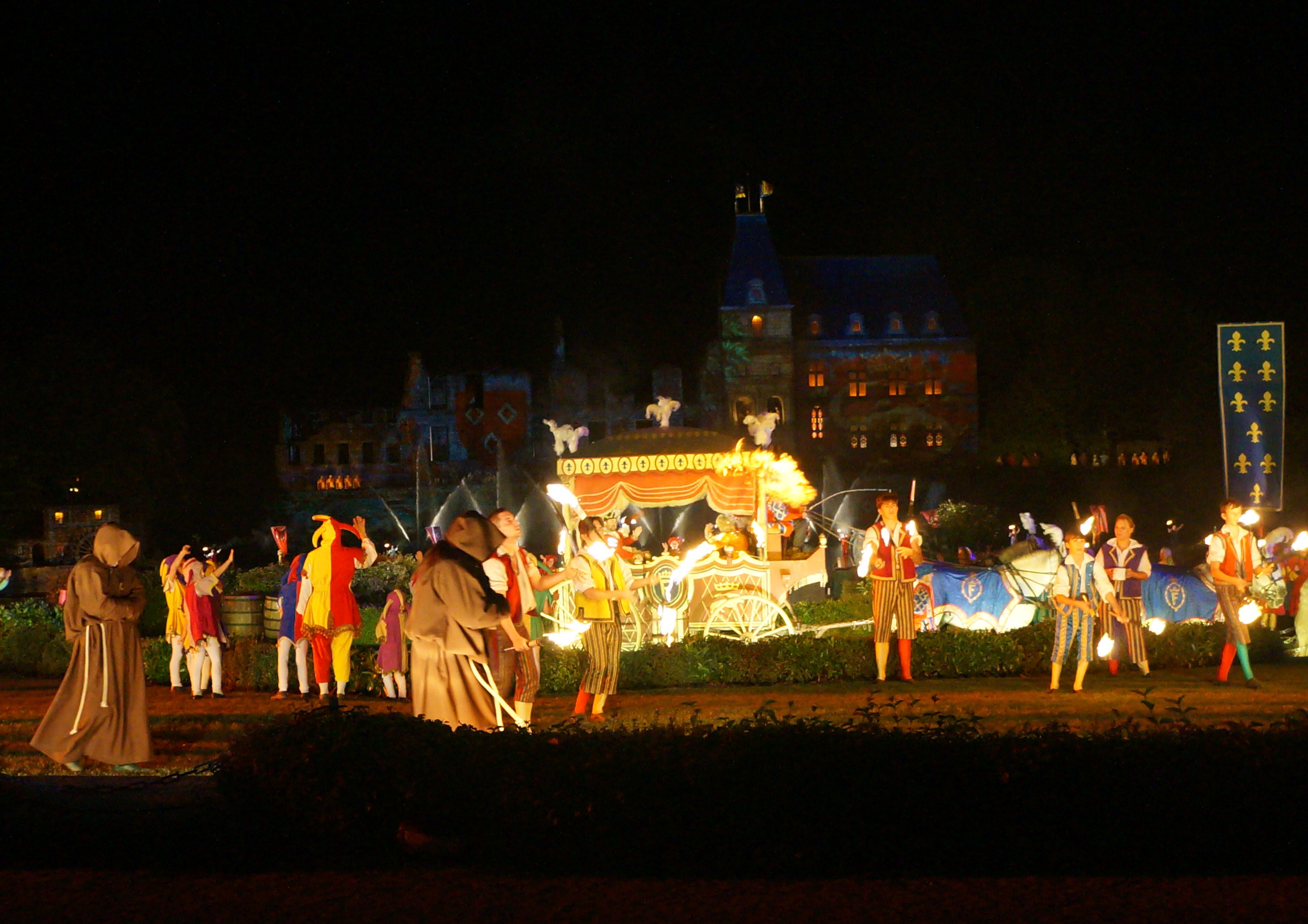 Le Puy du Fou Les Epesses.-.Vendée, France